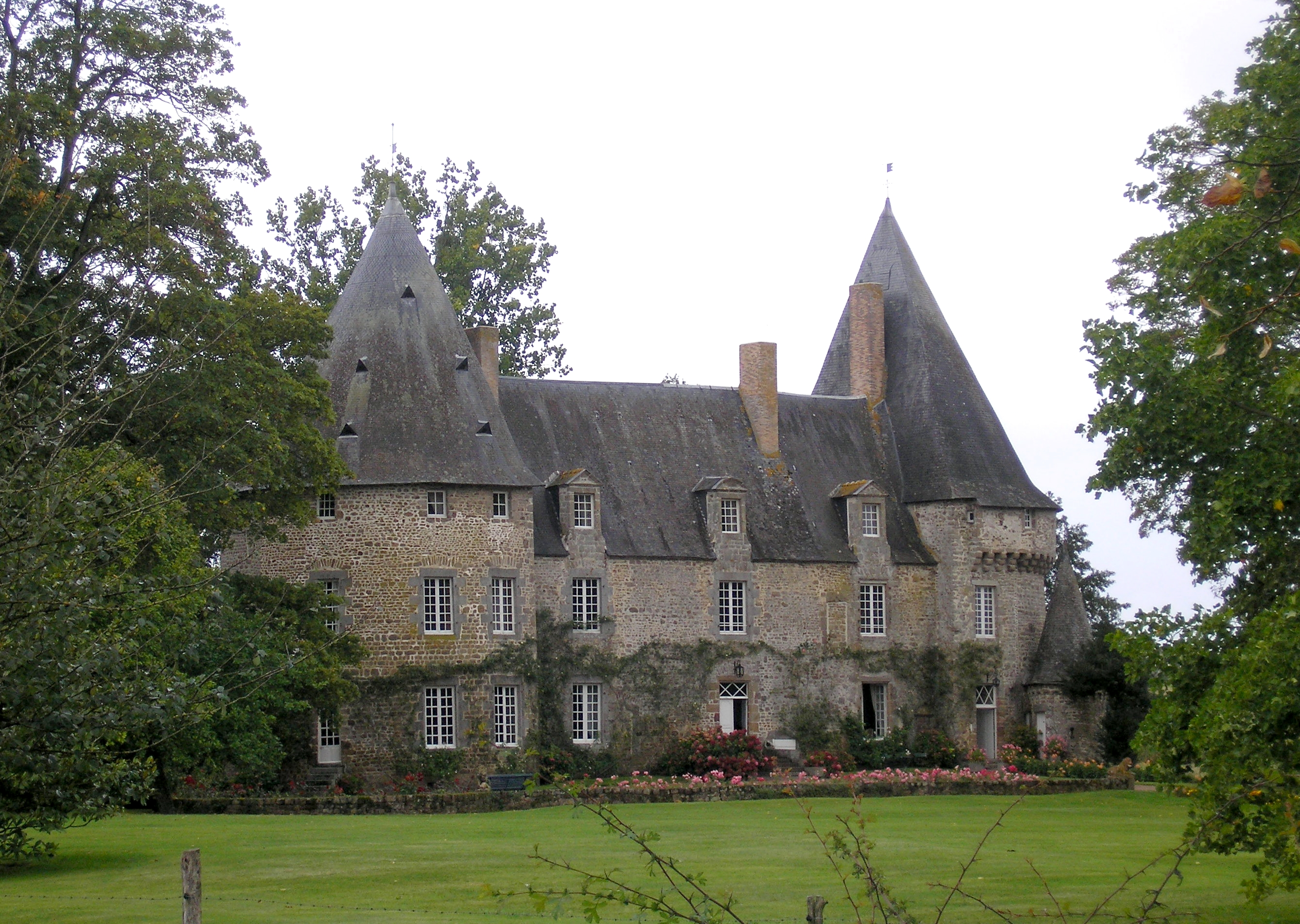 Rennes-en-Grenouilles (Pays de la Loire, France). Le château du Bois du Maine.